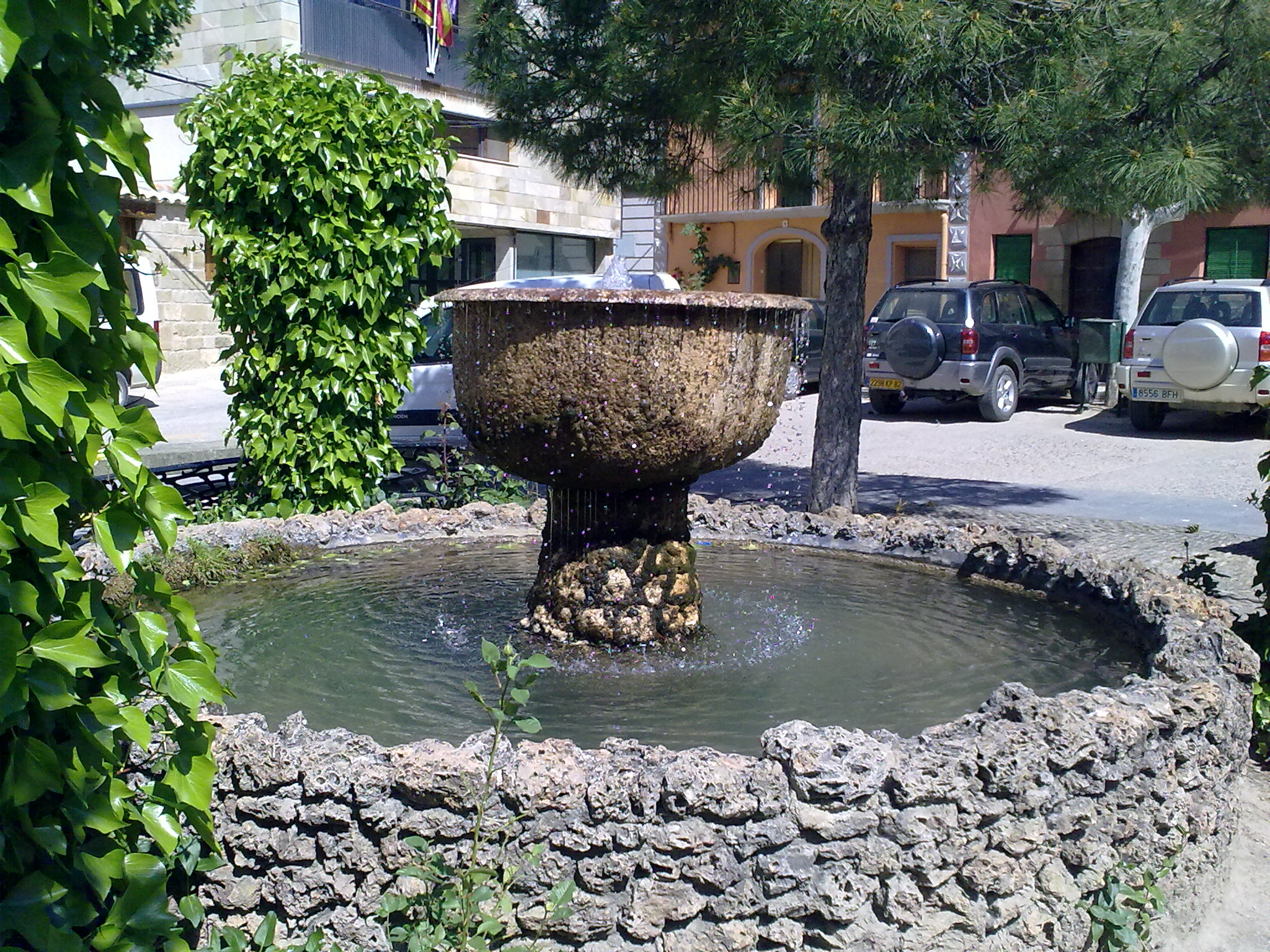 Loarre le 24 mai 2010. Espagne.